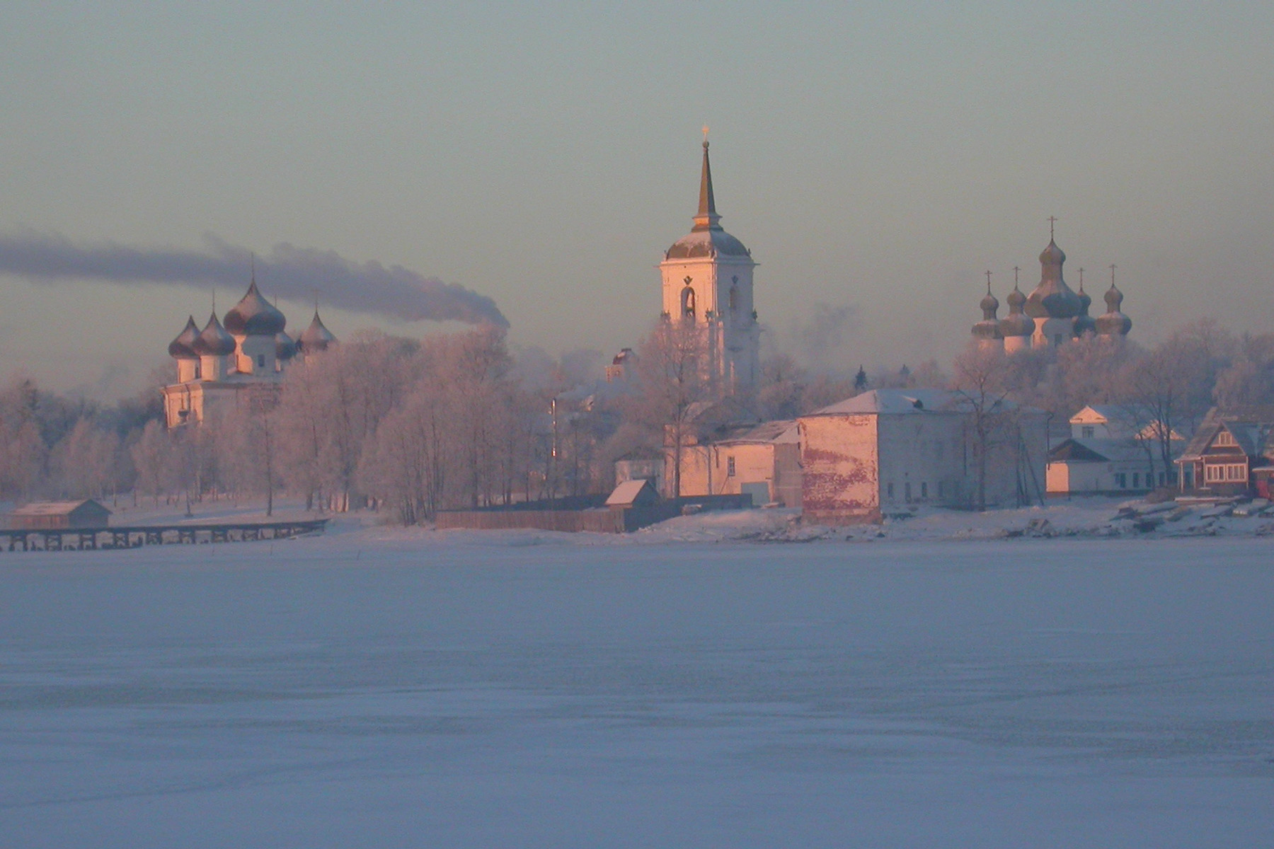 Соборная площадь на рассвете